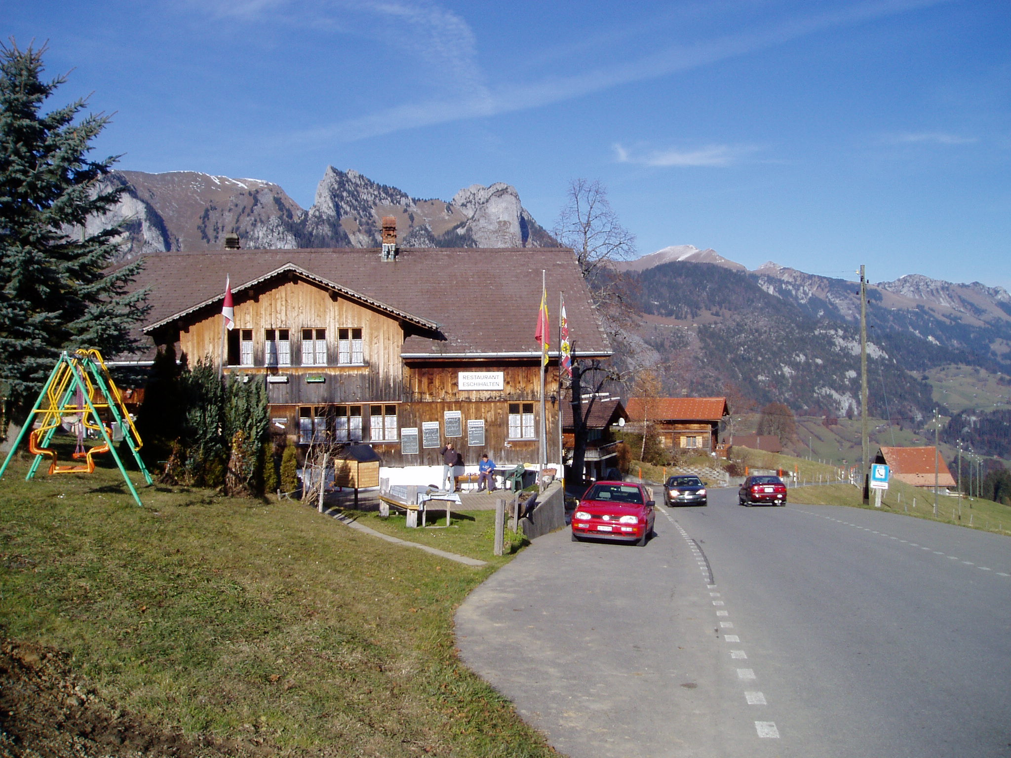 Jaunpass